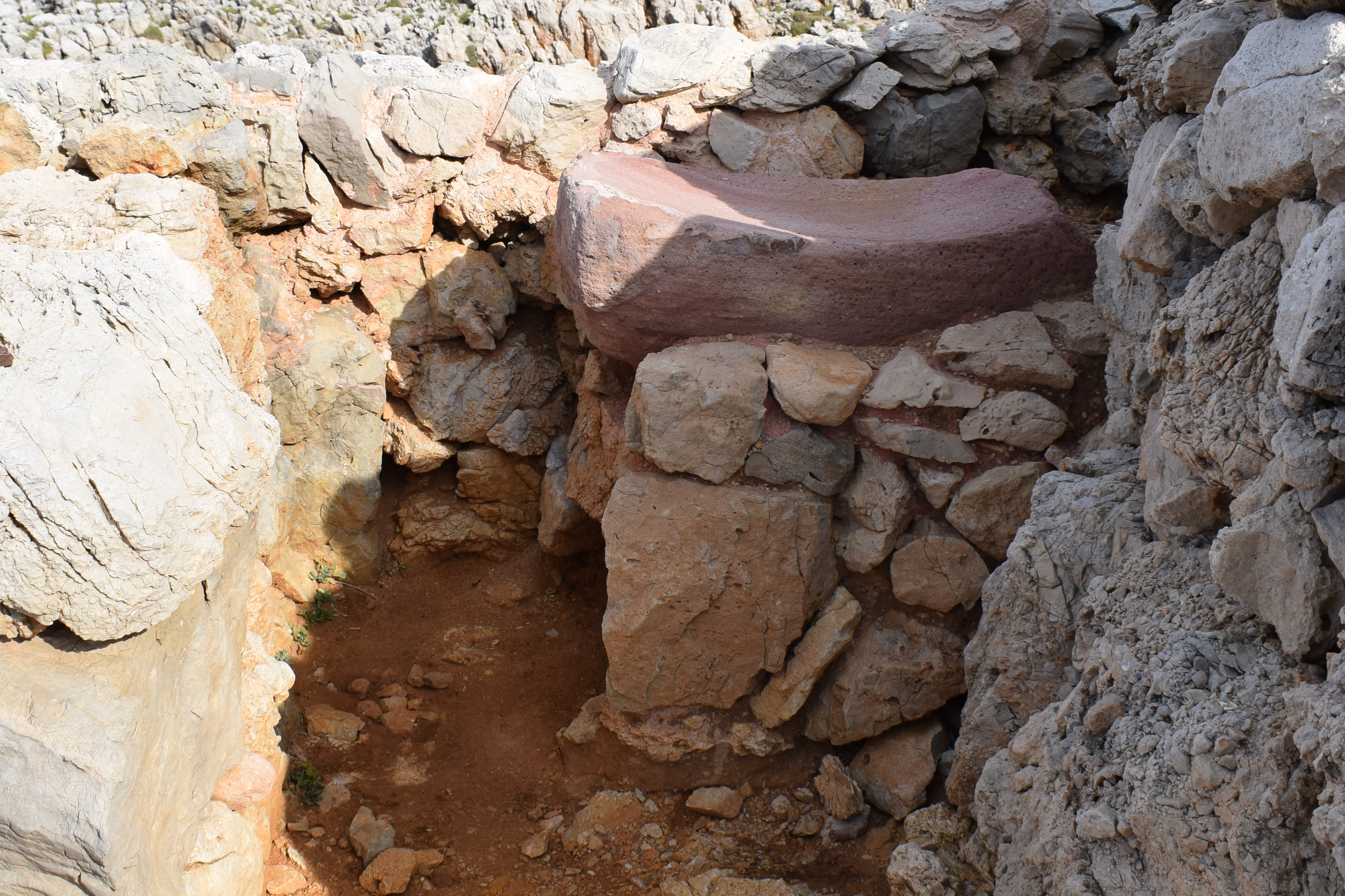 Mahlstein in der Nische des naviformen Hauses 11 in der Küstensiedlung von Cala Morell.